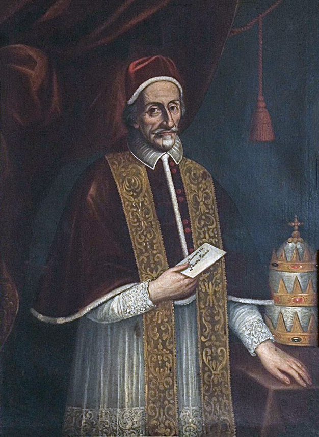 Ritratto di Papa Innocenzo VII - iscrizione (sul foglio di carta nella mano destra): INNOCENTIUS VII / PONTIFEX MAXIMUS